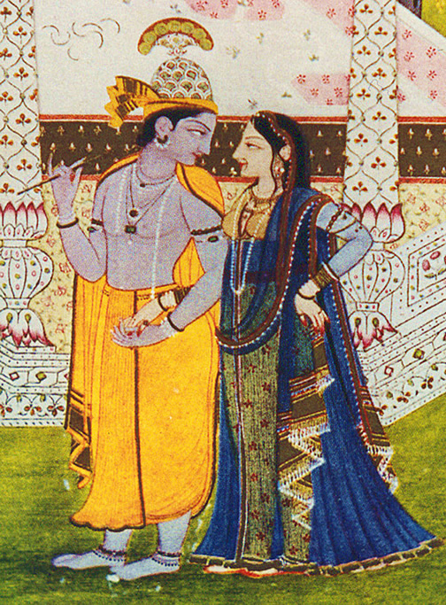 classical picture